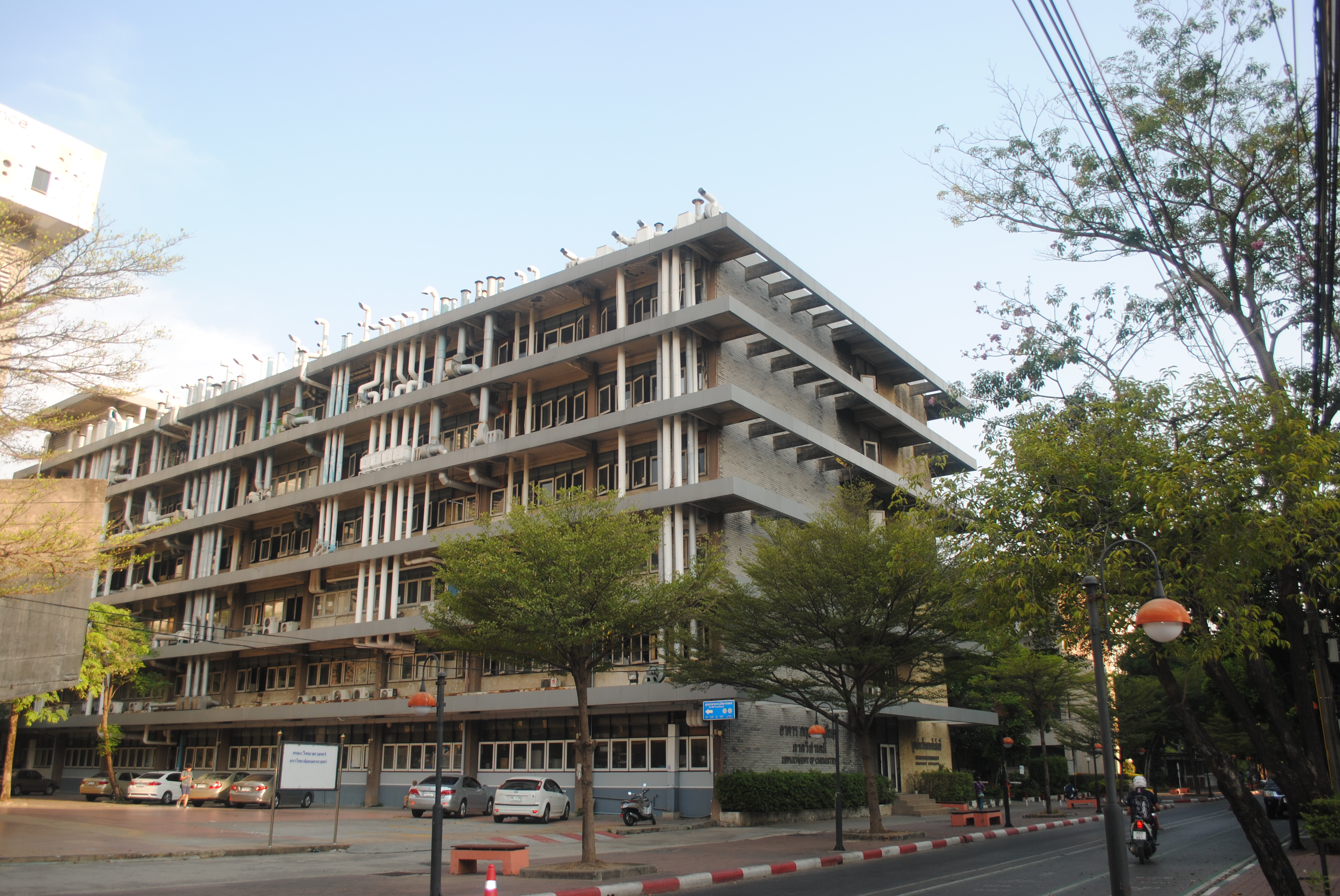 อาคารกฤษณา ชุติมา (ตึกเคมี) คณะวิทยาศาสตร์ มก.